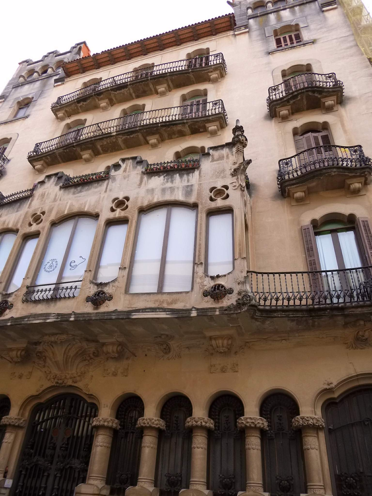 Casa Bau (Tortosa)